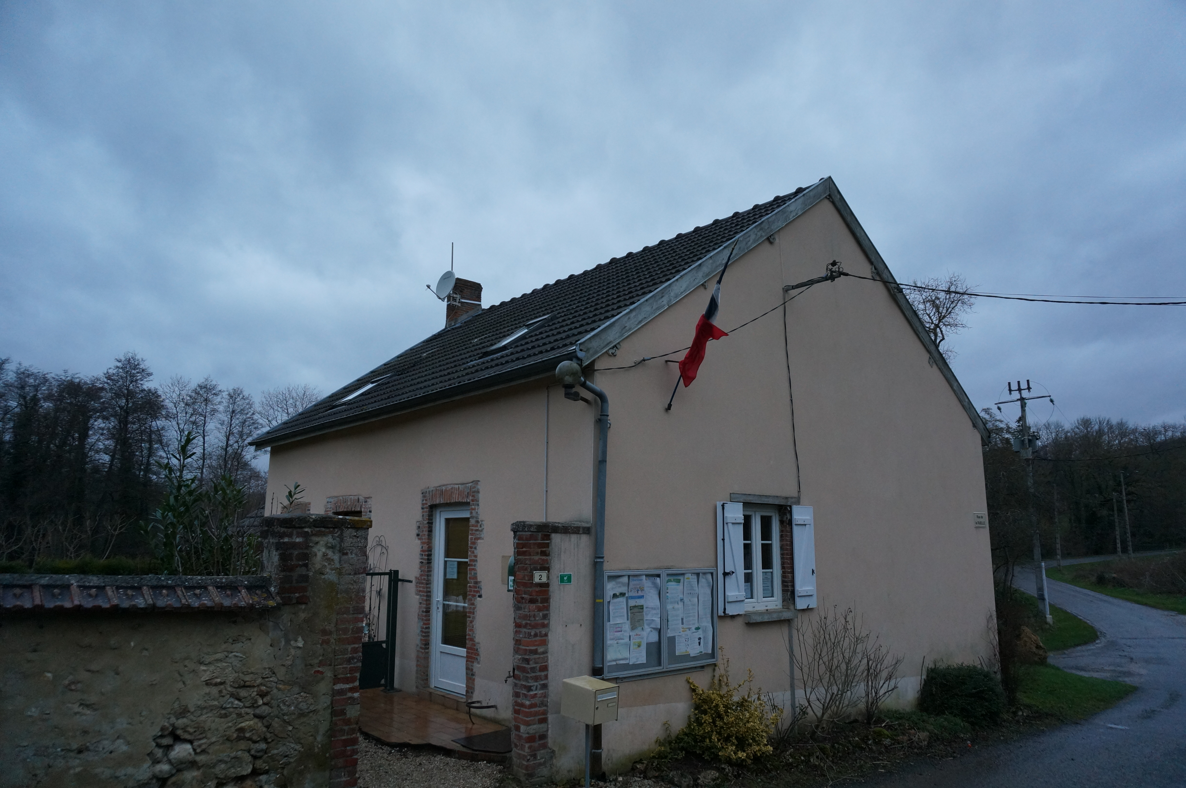 à Courtagnon.